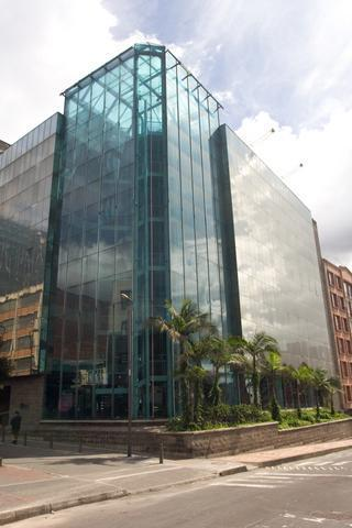 Esta fotografía corresponde al edificio APR de la Universidad Piloto de Colombia es tomada de del usuario fenix2012